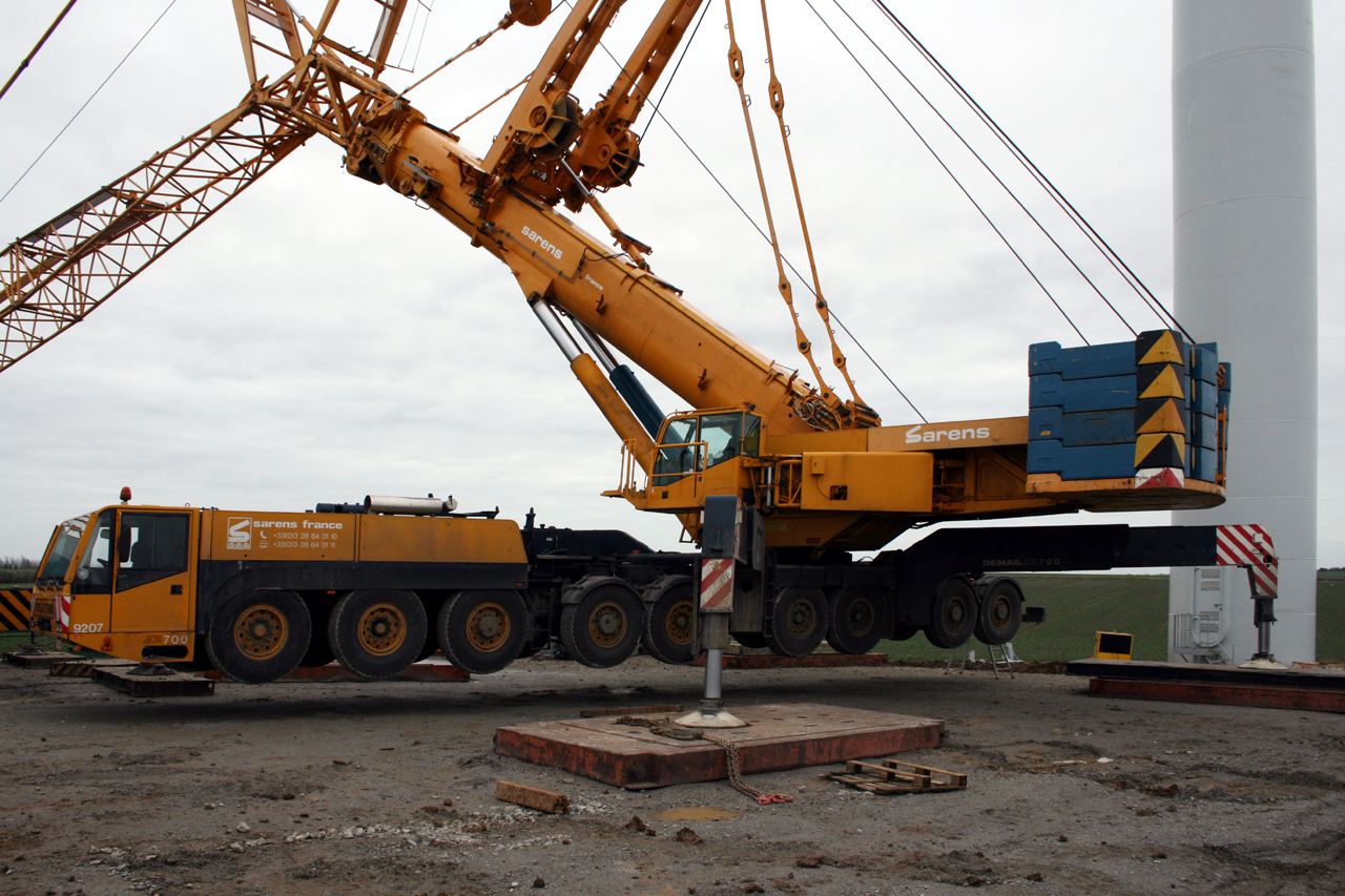 Grue mobile Demag AC 700